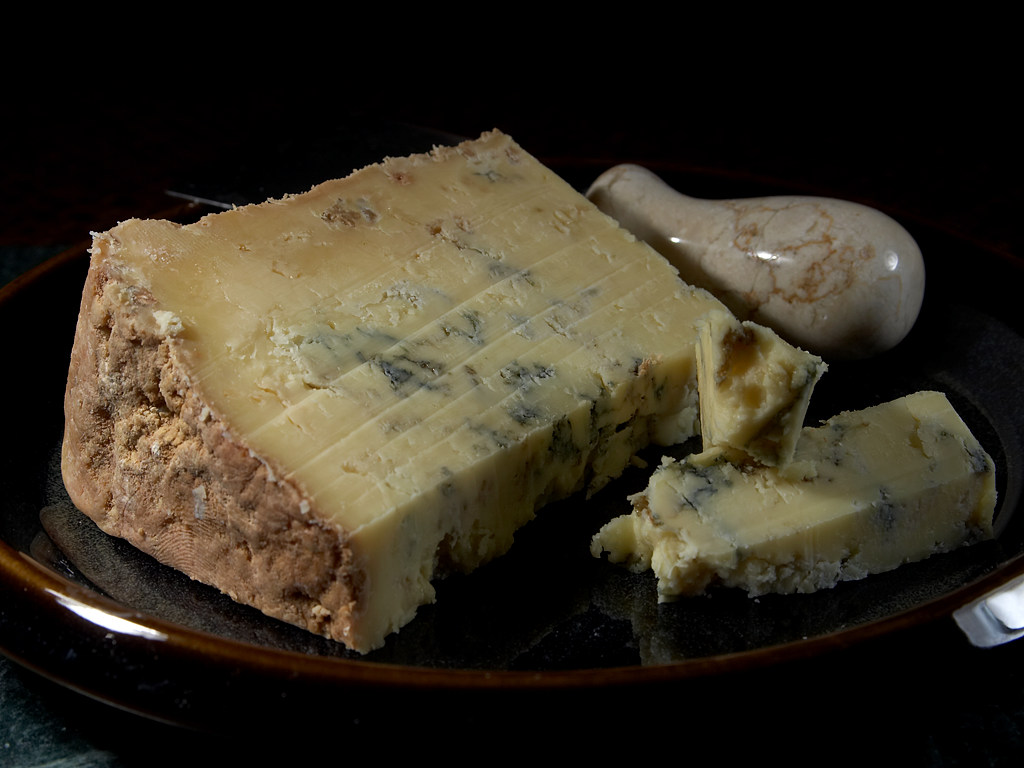 Dorset Blue Vinny Cheese